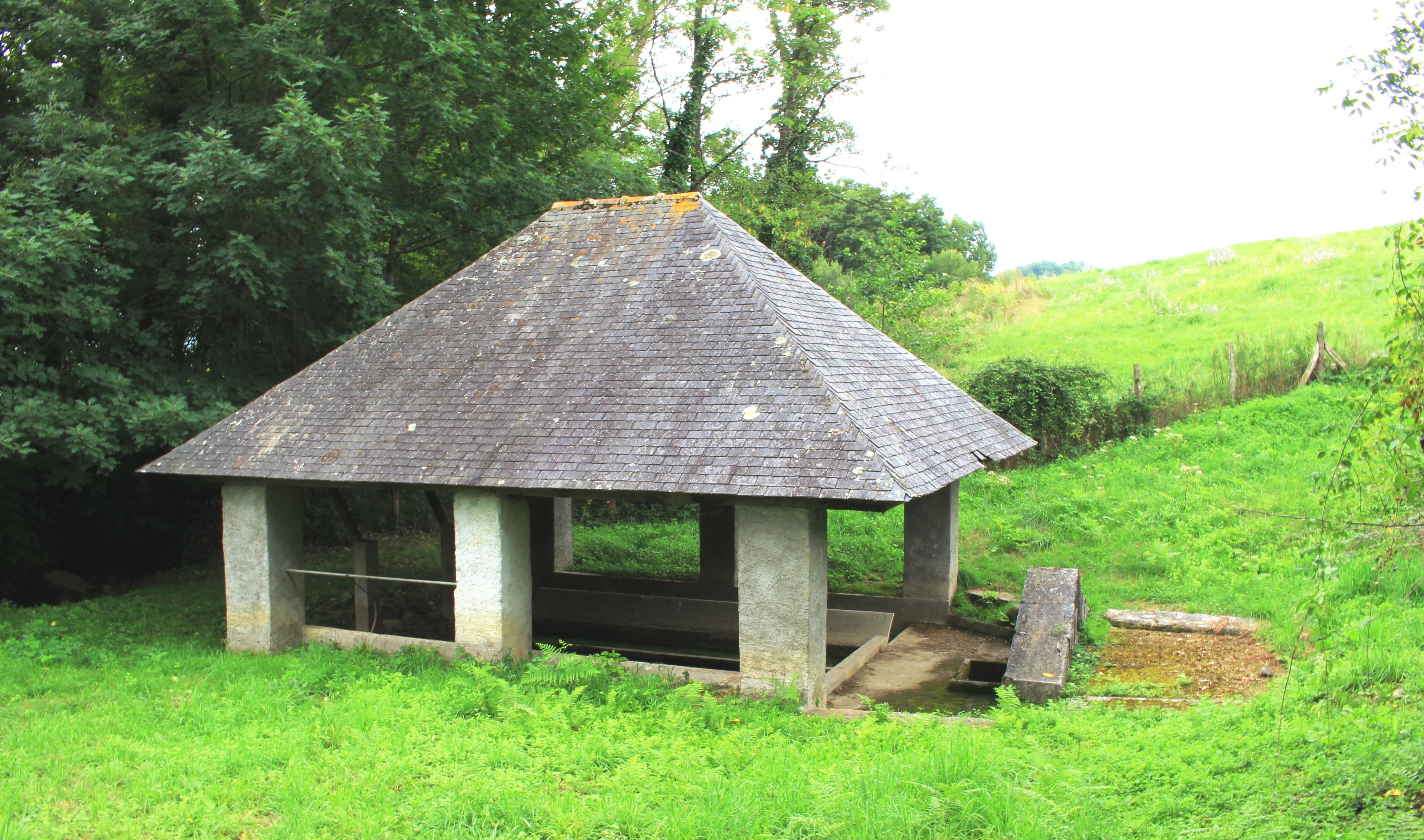 Lavoir de Lanne (Hautes-Pyrénées)